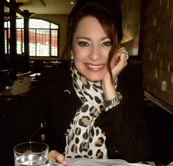 María Helena Döering Monsalve